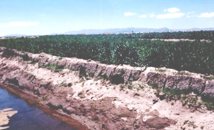 Waru waru moderno, construido durante el Programa de Recuperación de tierras, con financiamiento de la Unión Ruropea - 1988 - 1991 Autor: Alfredo Bianco